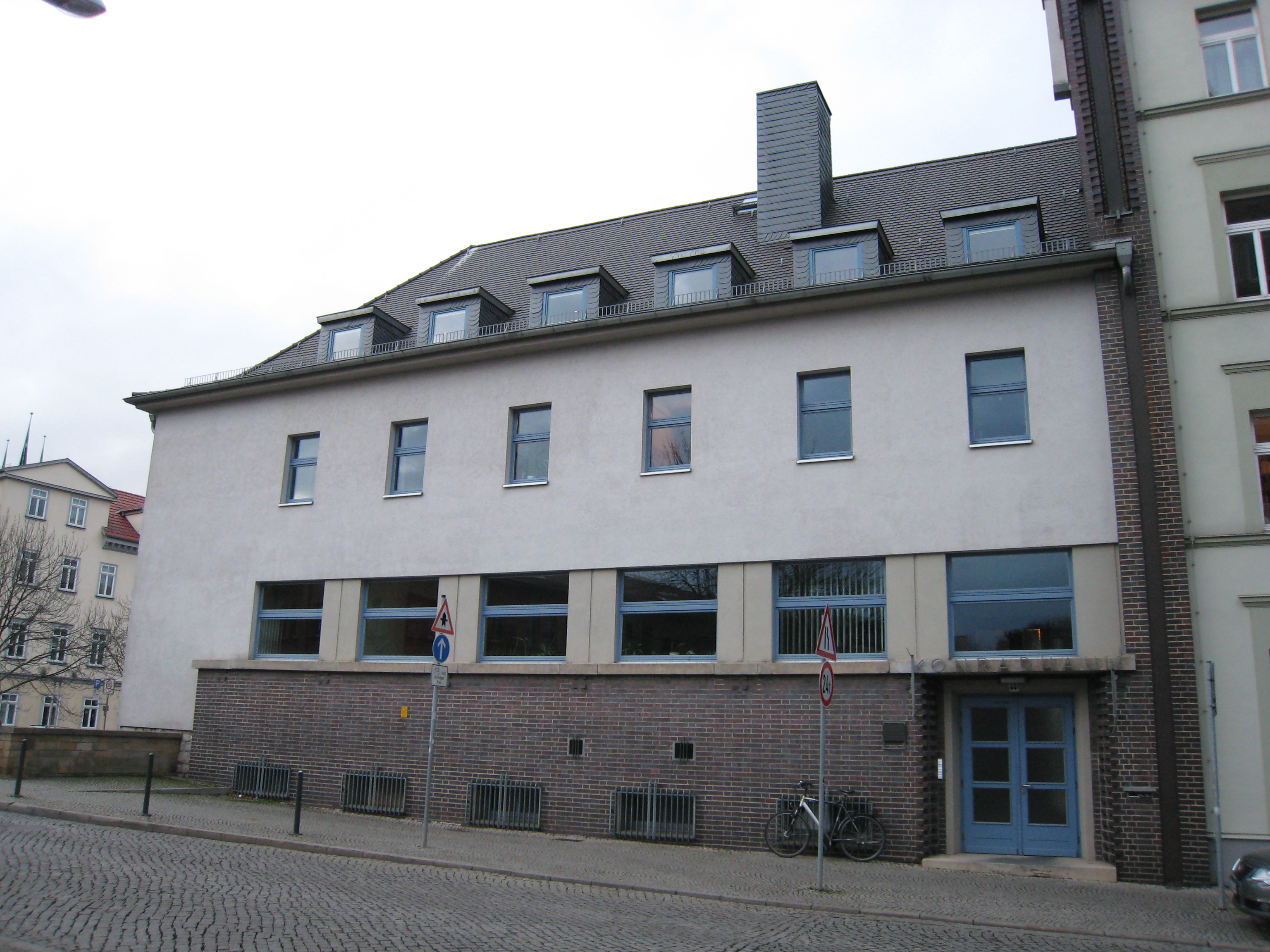 Konradhaus Erfurt, Regierungsstraße 44a